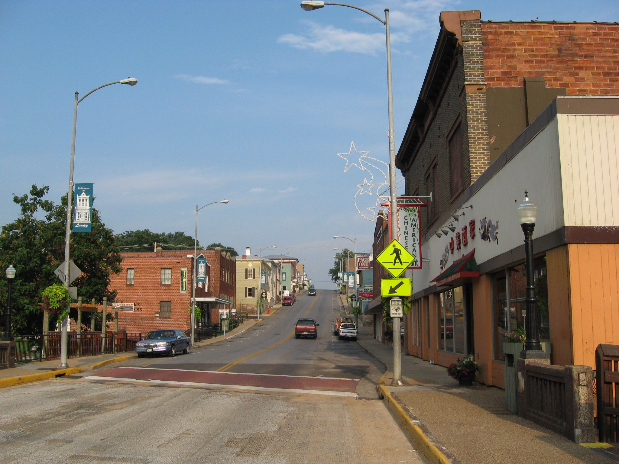 Luray, Virginia